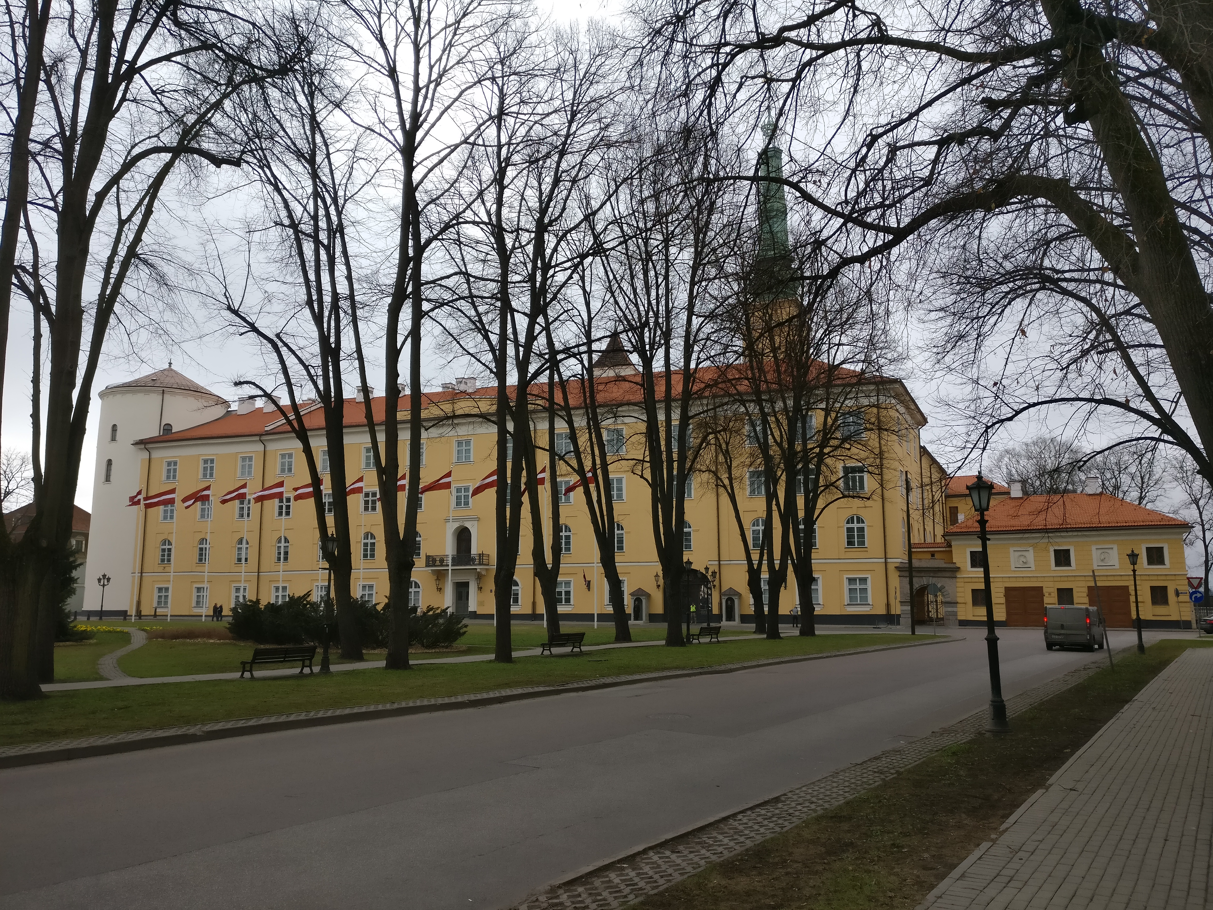 Rīgas pils